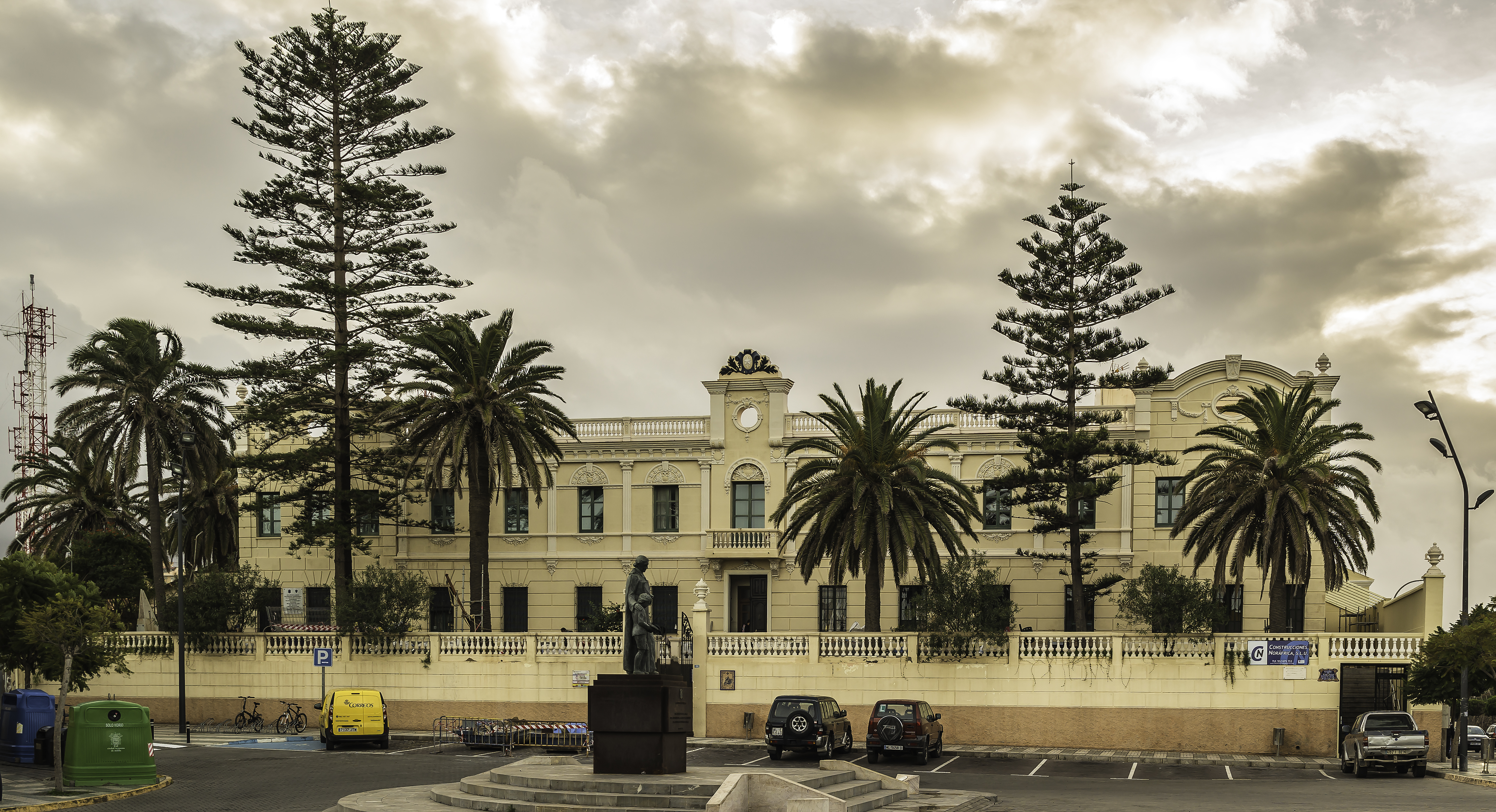 El Colegio La Salle el Carmen es un colegio de los Hermanos de la Doctrina Cristiana ubicado en la plaza de San Juan Bautista de la Salle de Melilla, en España. Forma parte del Conjunto Histórico Artístico de la Ciudad de Melilla, un Bien de Interés Cultural.